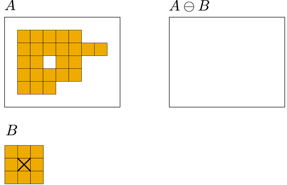 Een voorbeeld van een erosie uitgevoerd op een beeld met een structuur element